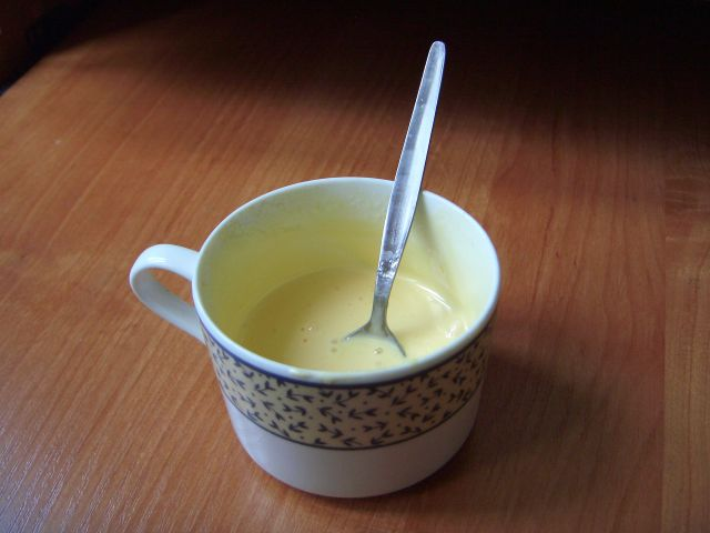 Kogel Mogle